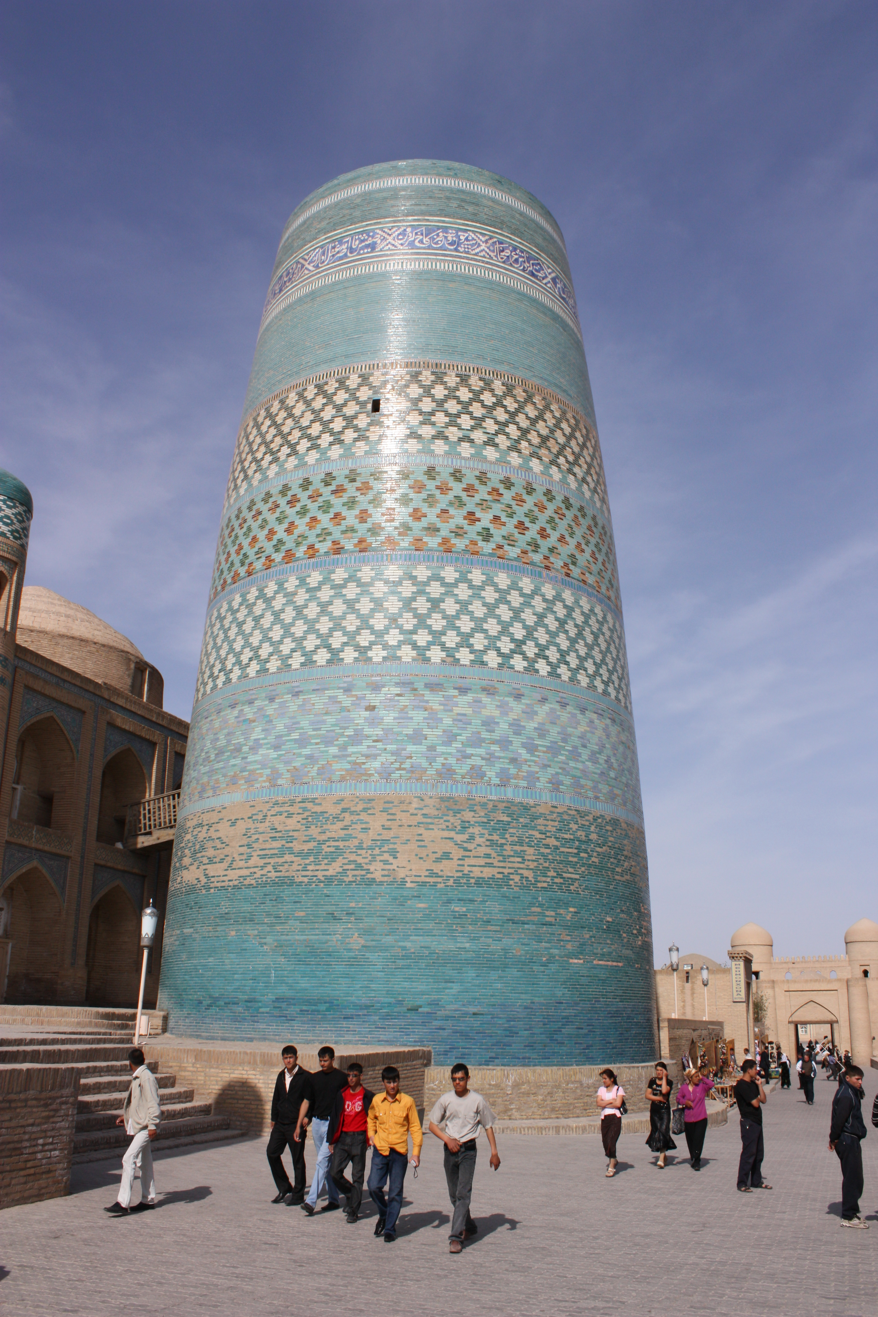 Khiva, Kalta Minor Minaret